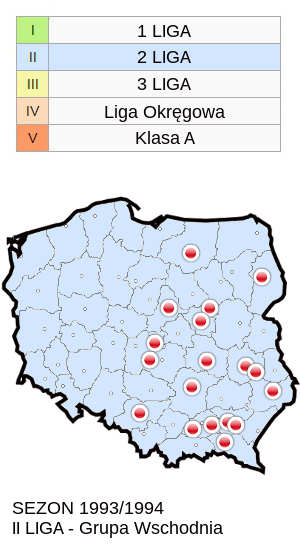 Jagiellonia w sezonie 1999/94 mapa